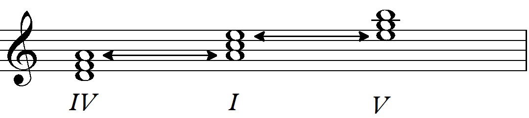 Relaciones Primarias en la Escala Menor Natural